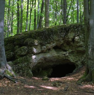 Jungfernhöhle zwischen Tiefenellern und Laibarös auf Wikipediaformat gebracht --Immanuel Giel 11:47, 29. Mär 2005 (CEST) (für die GNU FDL)